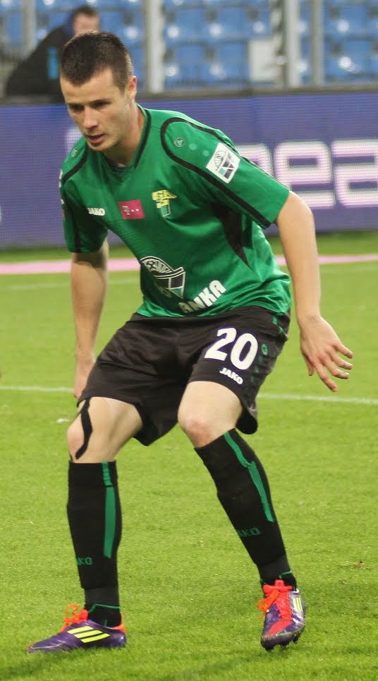 Lukas Bielak w barwach Górnika Łęczna